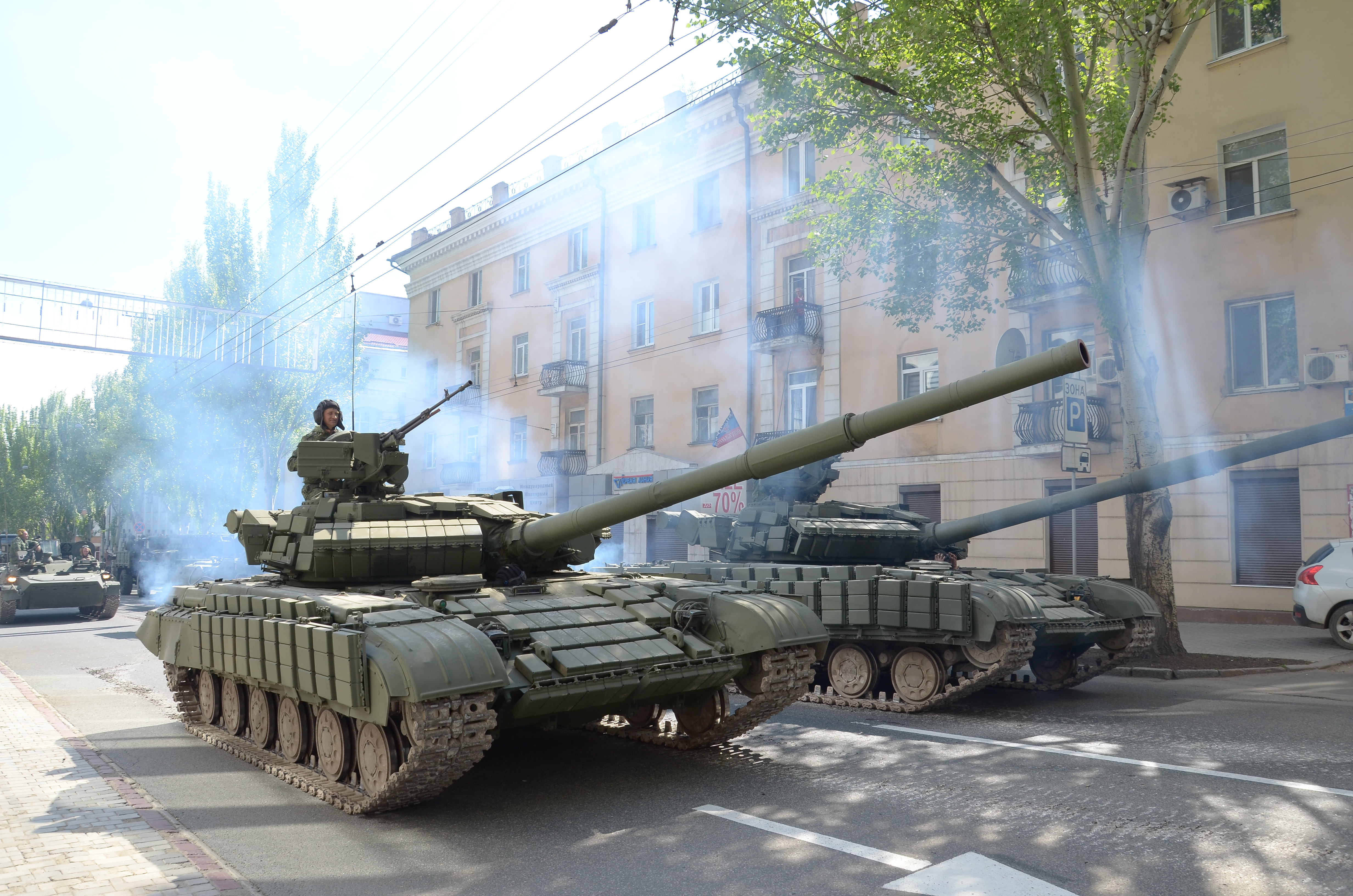 День Победы в Донецке